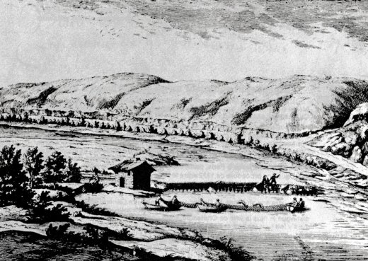 Les pescheries de saumons.